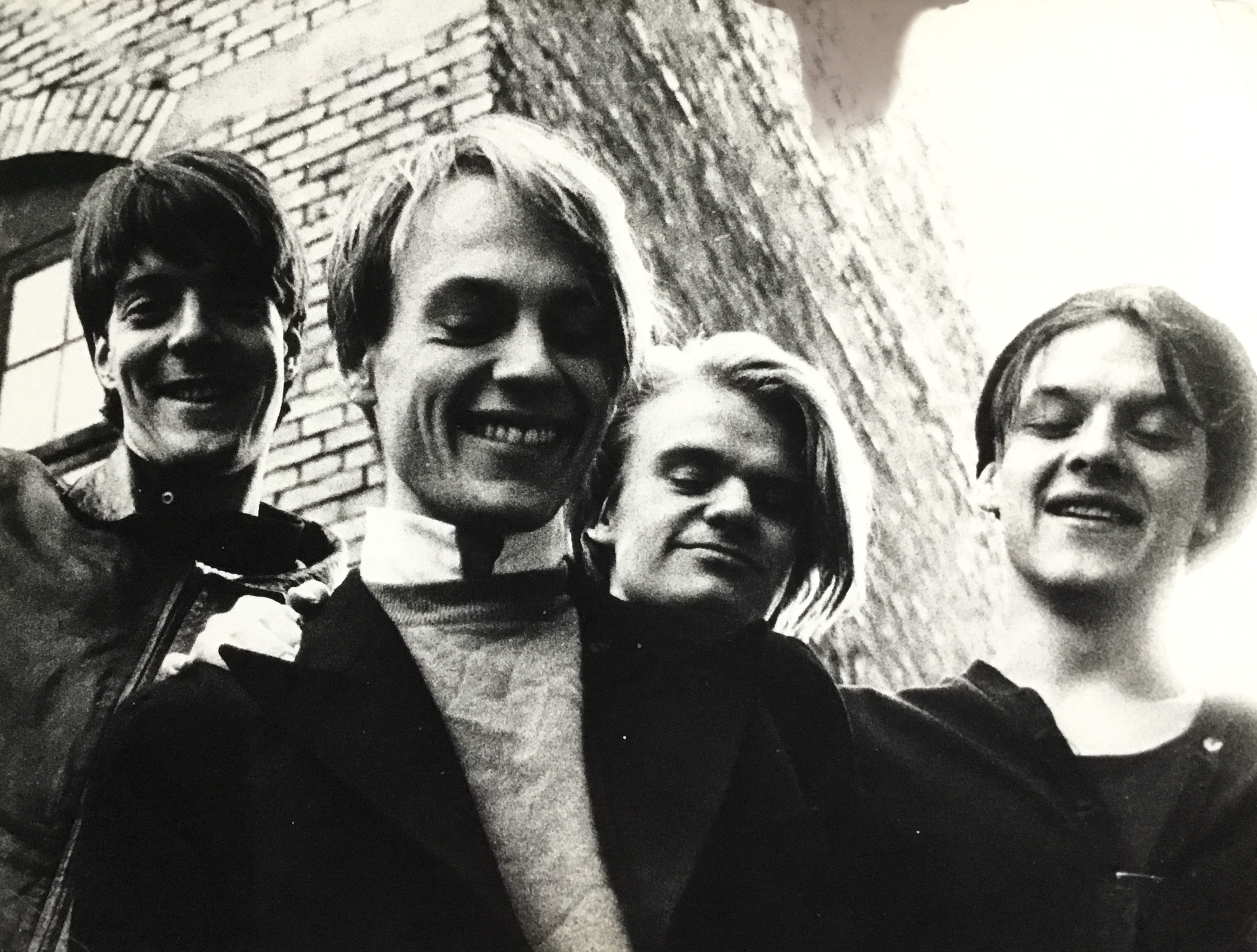 Buoyant Blue,. Peter Degerbøl, Lars Lundholm, Lars Stabell og Peter Peter Schneidermann. 1985